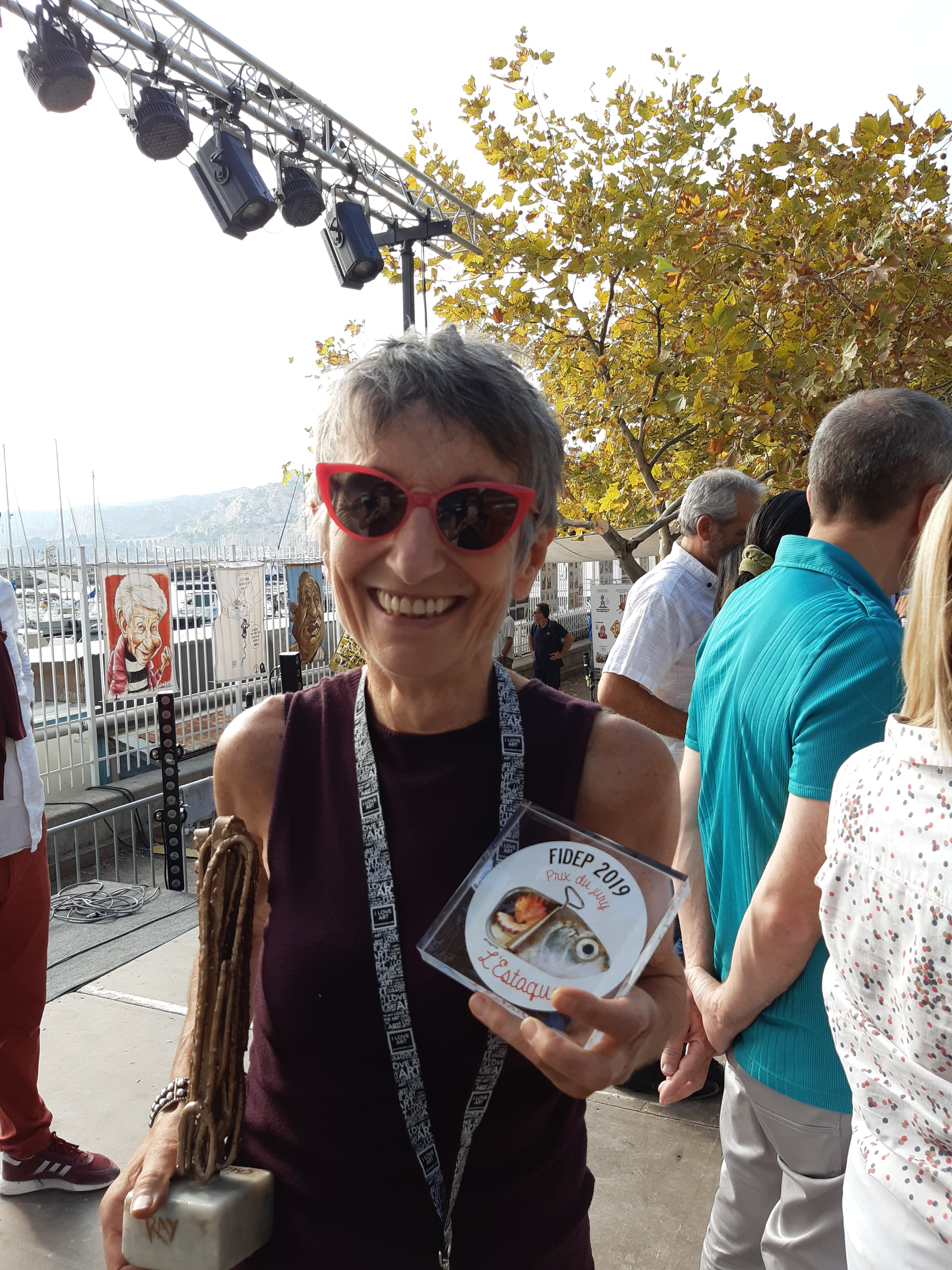 remise des prix, Trax, caricaturiste loréate